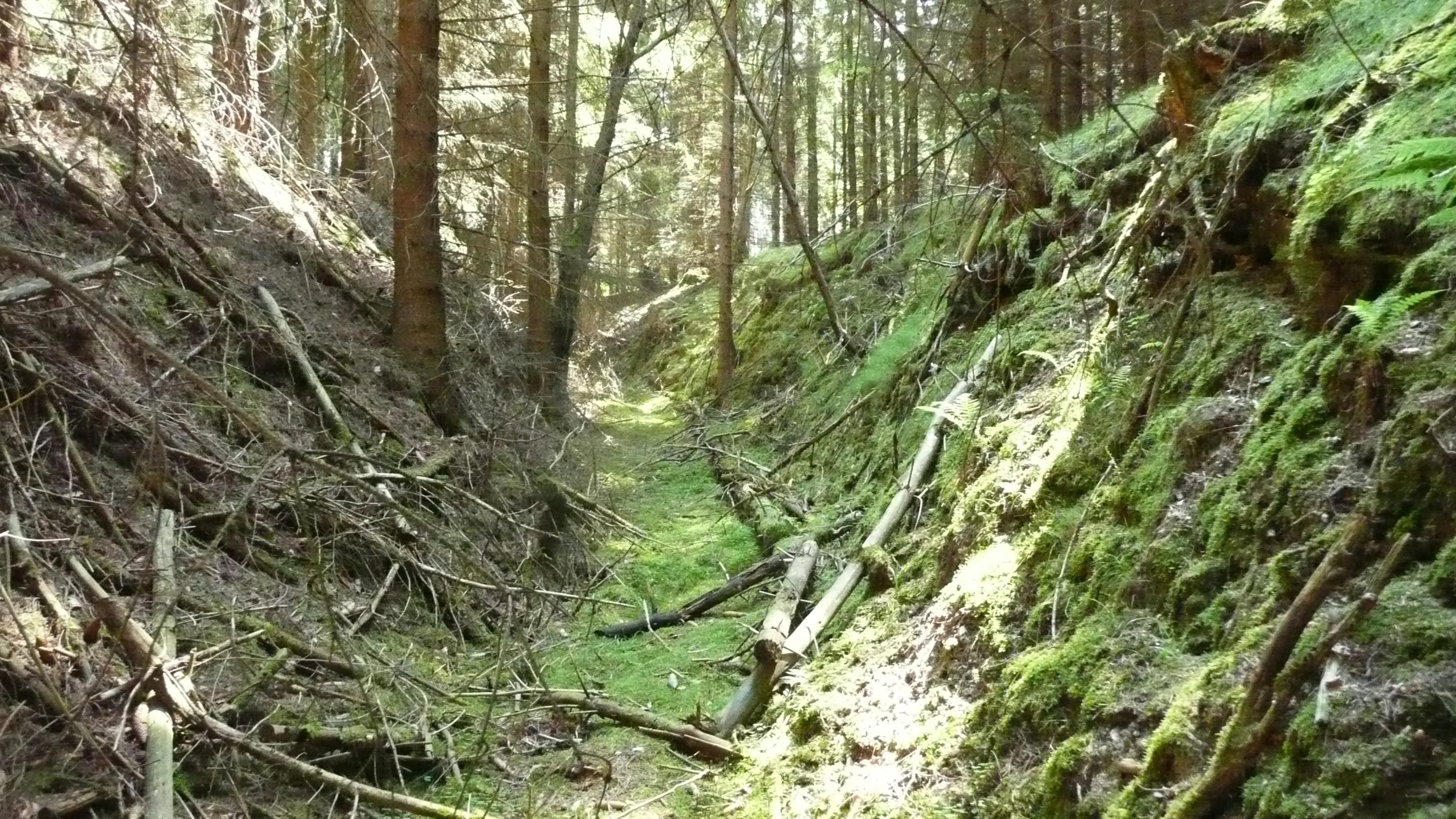 Typická příroda okolí města Kladruby.